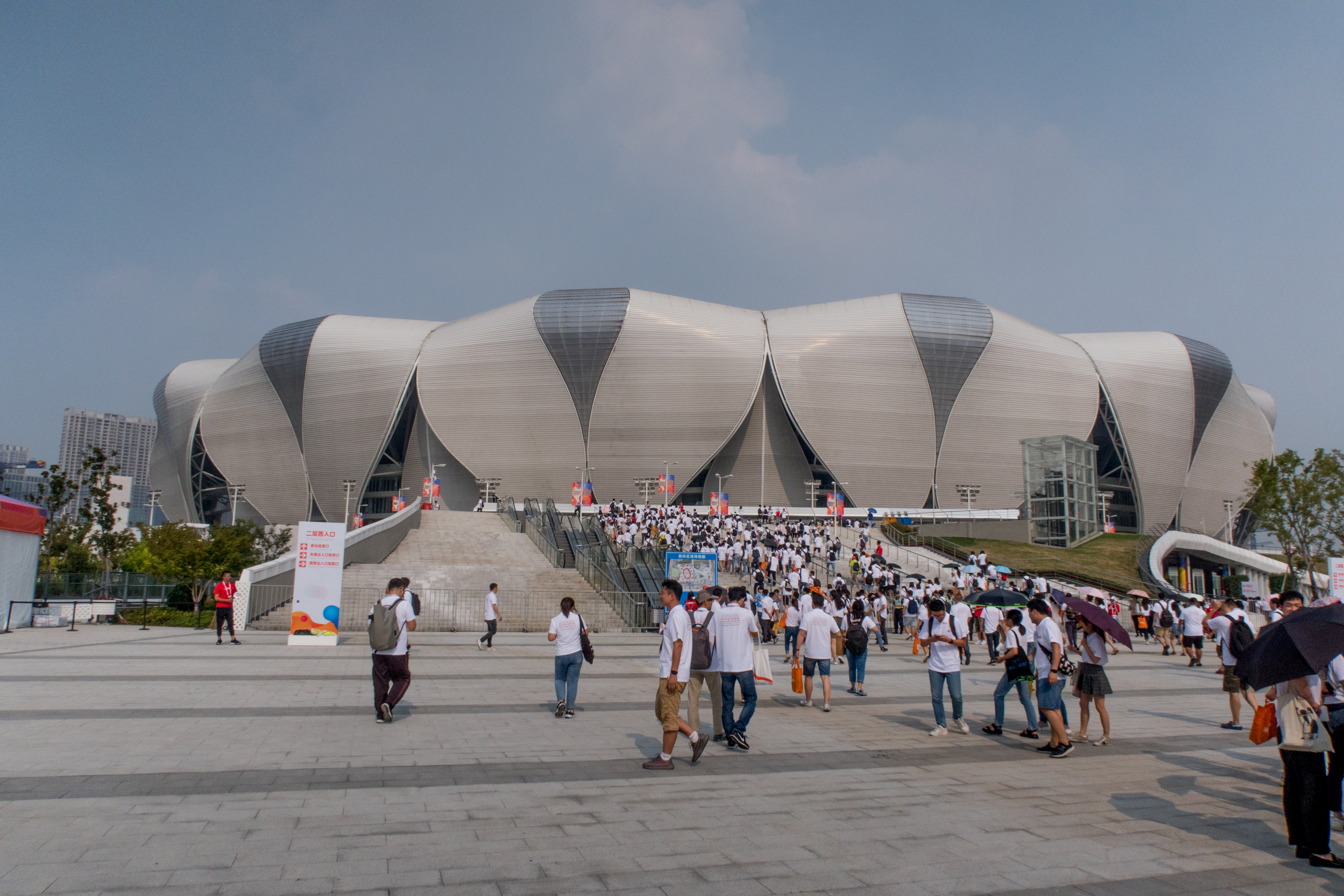 杭州奥体中心主体育场